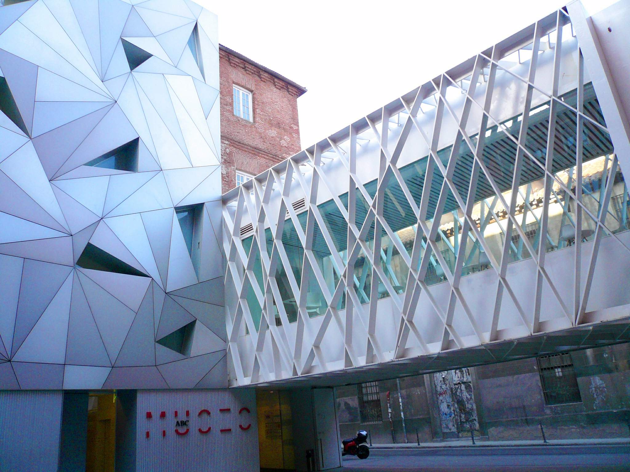 Museo ABC (Madrid)